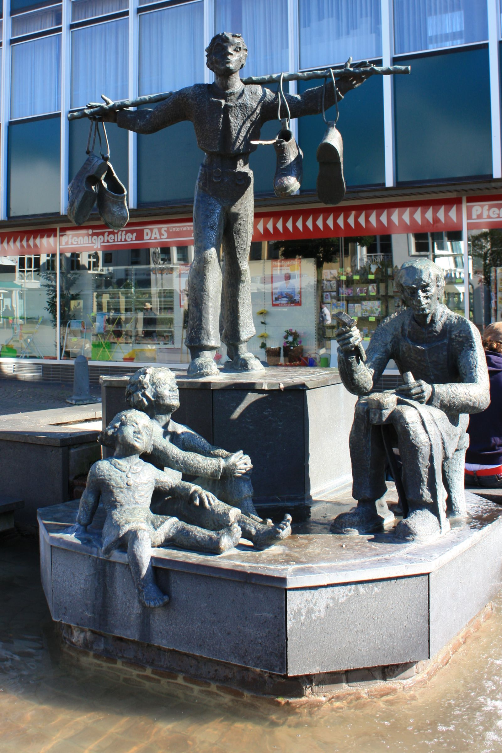 Schusterbrunnen in Montabaur, Rheinland-Pfalz